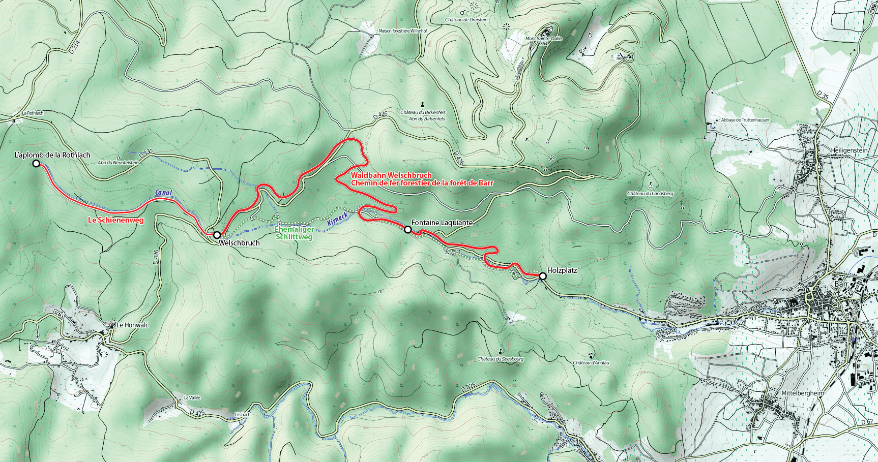 Karte der Waldeisenbahn Welschbruch